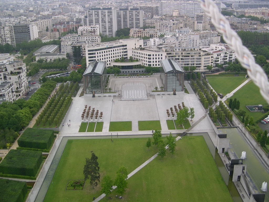 Vue aérienne du Parc André Citroën (Est).